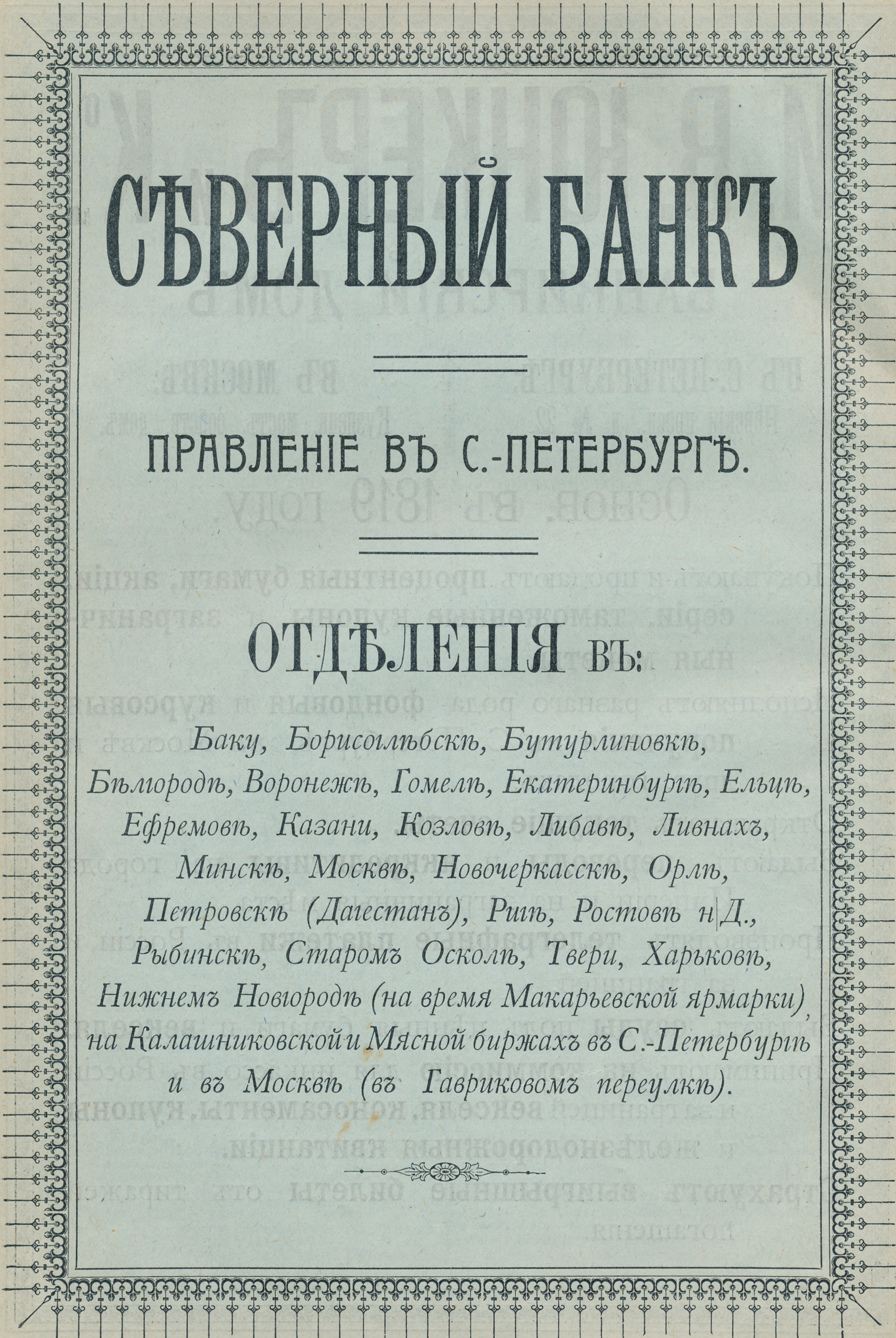 Реклама Северного банка, 1907 год.